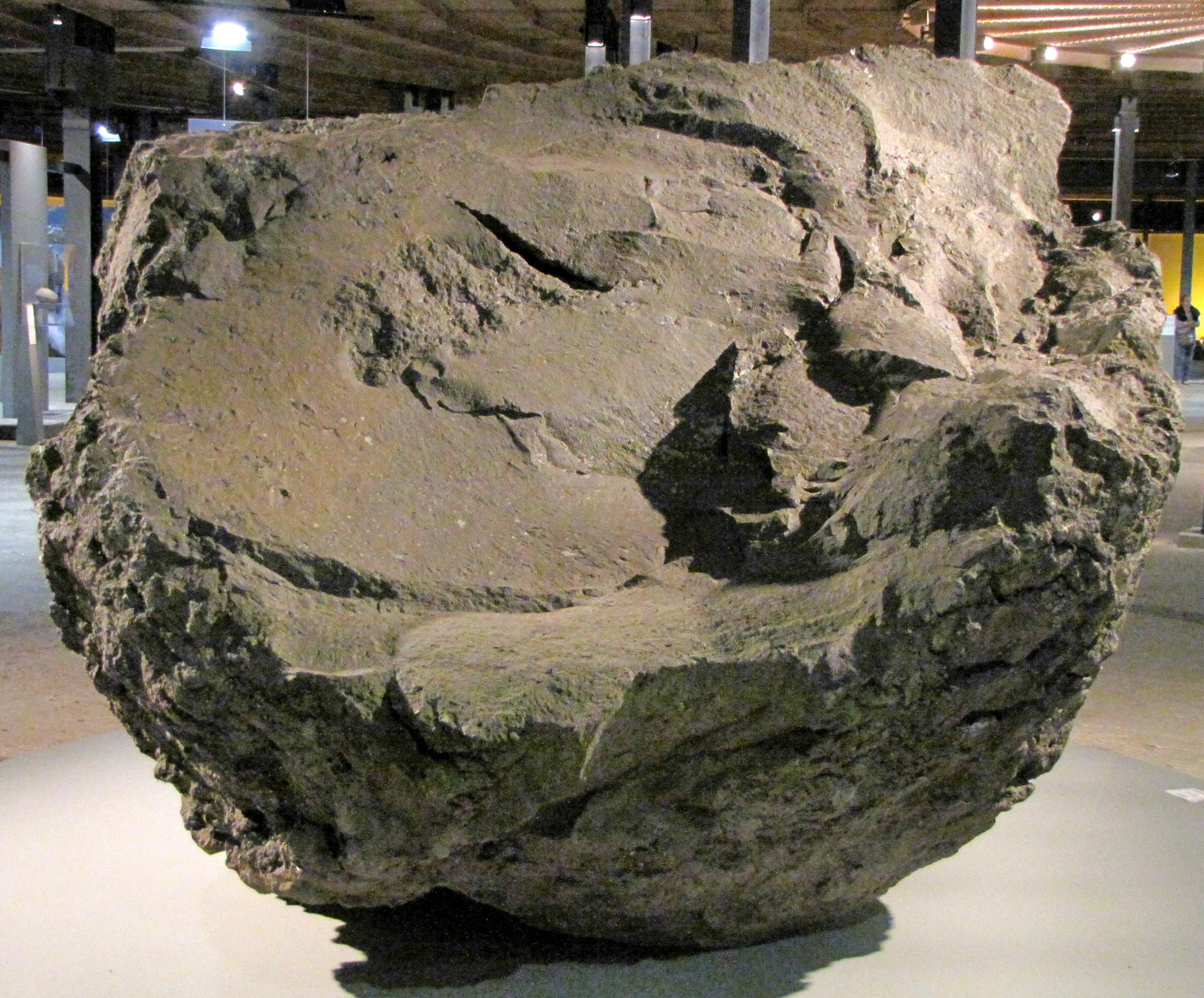 Gasometer Oberhausen. Ausstellung "Magische Orte", 2011. Vulkanische Bombe, Vulkaneifel (Landkreis Ahrweiler). Kunkskopf. 350.000 vor Christus.